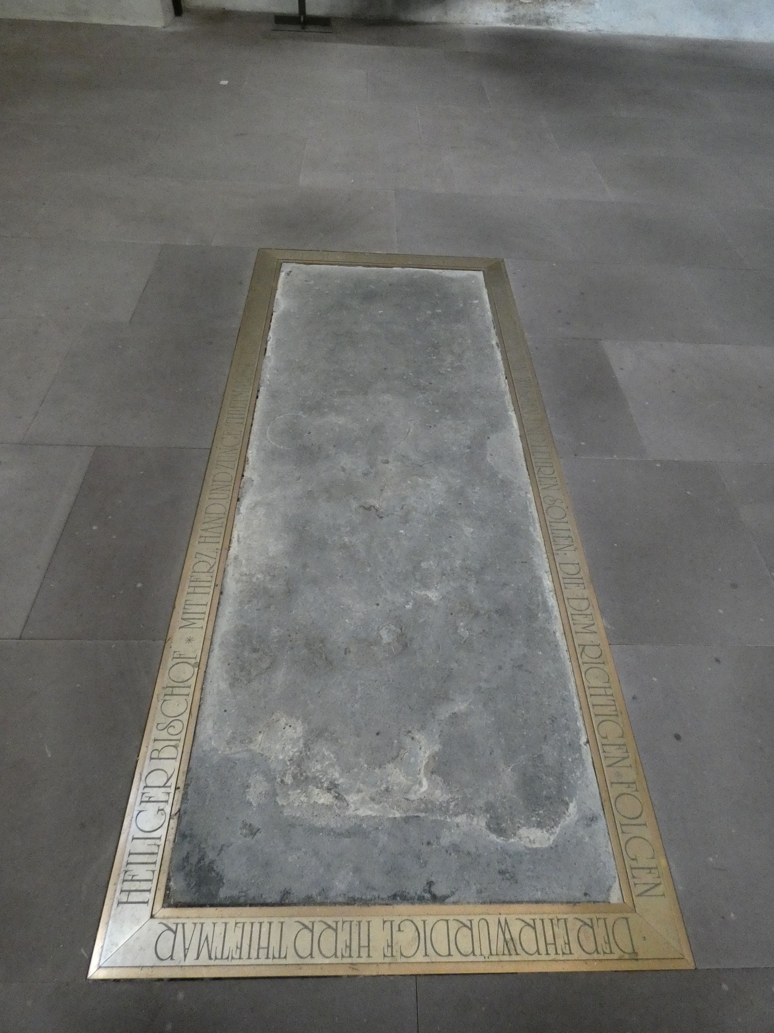 Sandsteinplatte des Grabes von Bischof Thietmar in der Bischofskapelle des Merseburger Doms